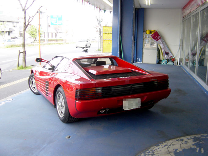 Ferrari-TESTAROSSA(フェラーリ),Hiroshima Japan